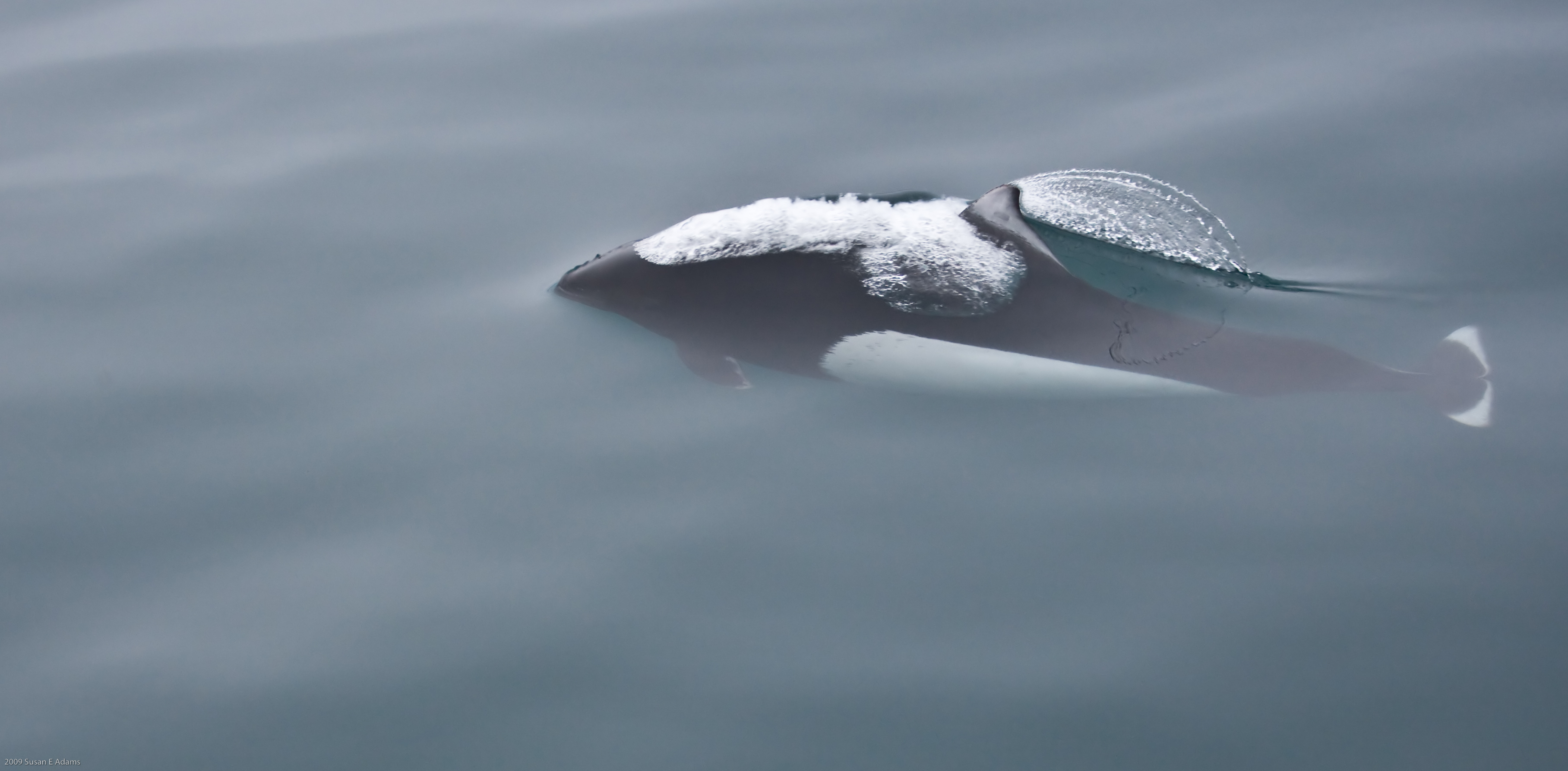 Phocoenoides dalli